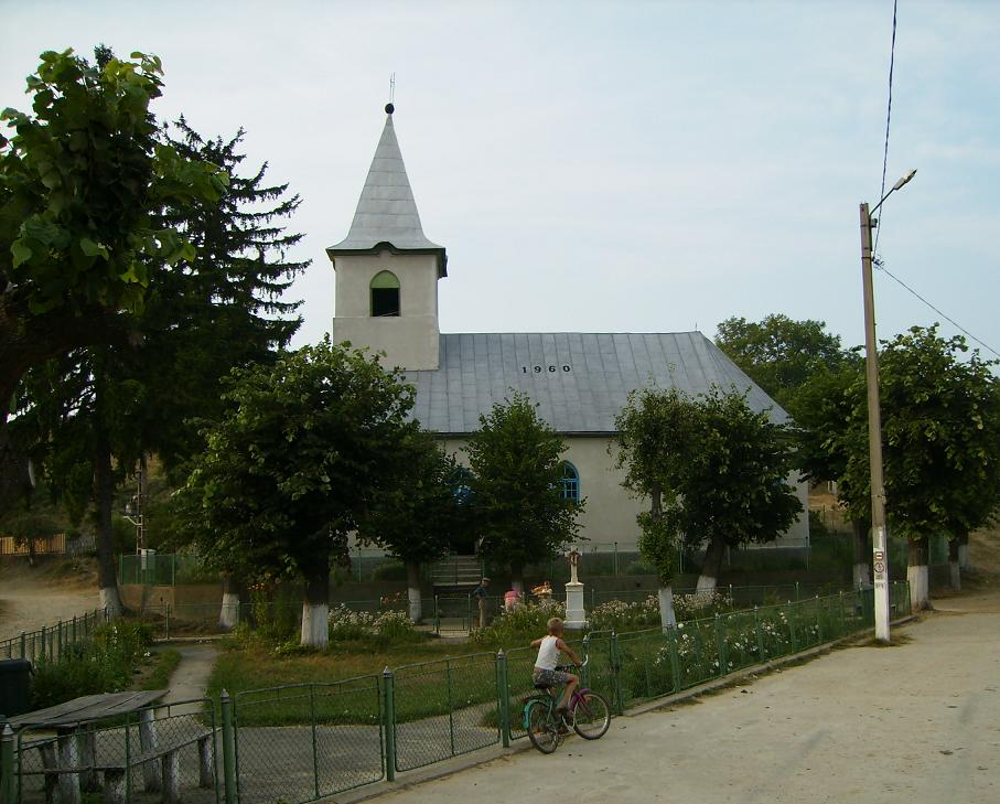 Rovensko (Banát) - náves, kostel